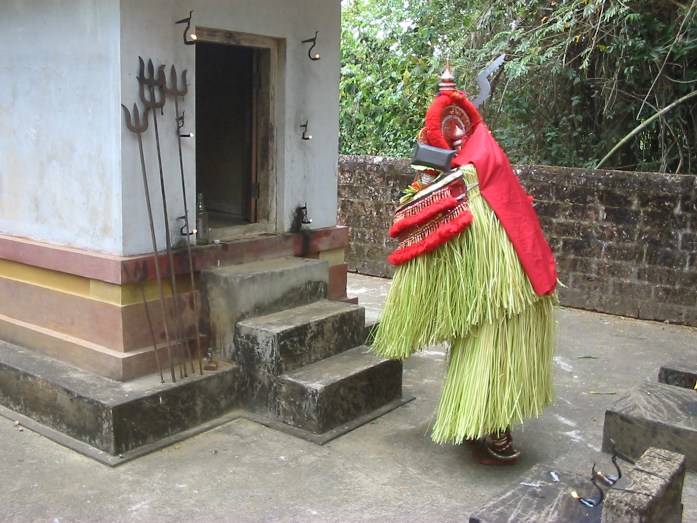 കാസർഗോഡു ജില്ലയിലെ കോടോം-ബേളൂർ പഞ്ചായത്തിൽ കണ്ടടുക്കത്ത് സ്ഥിതിചെയ്യുന്ന കരിഞ്ചാമുണ്ഡിയമ്മയുടെ കാവ്